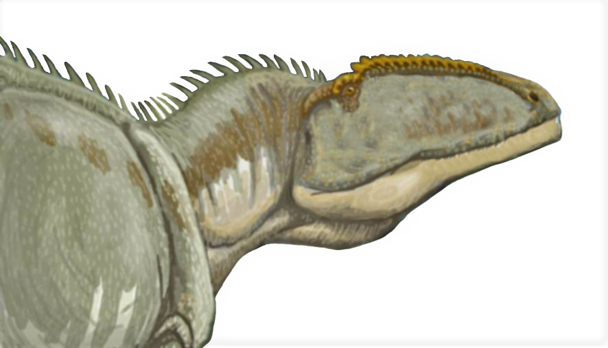 Carcharodontosaurus